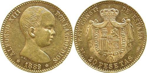 20 pesetas